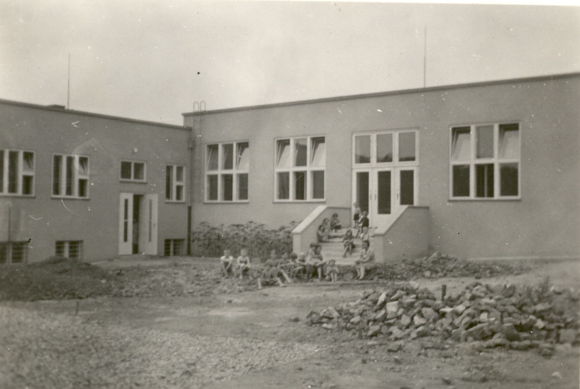 Milíčův dům v roce. 1933, foto z Archivu P. Pittra a O. Fierzové